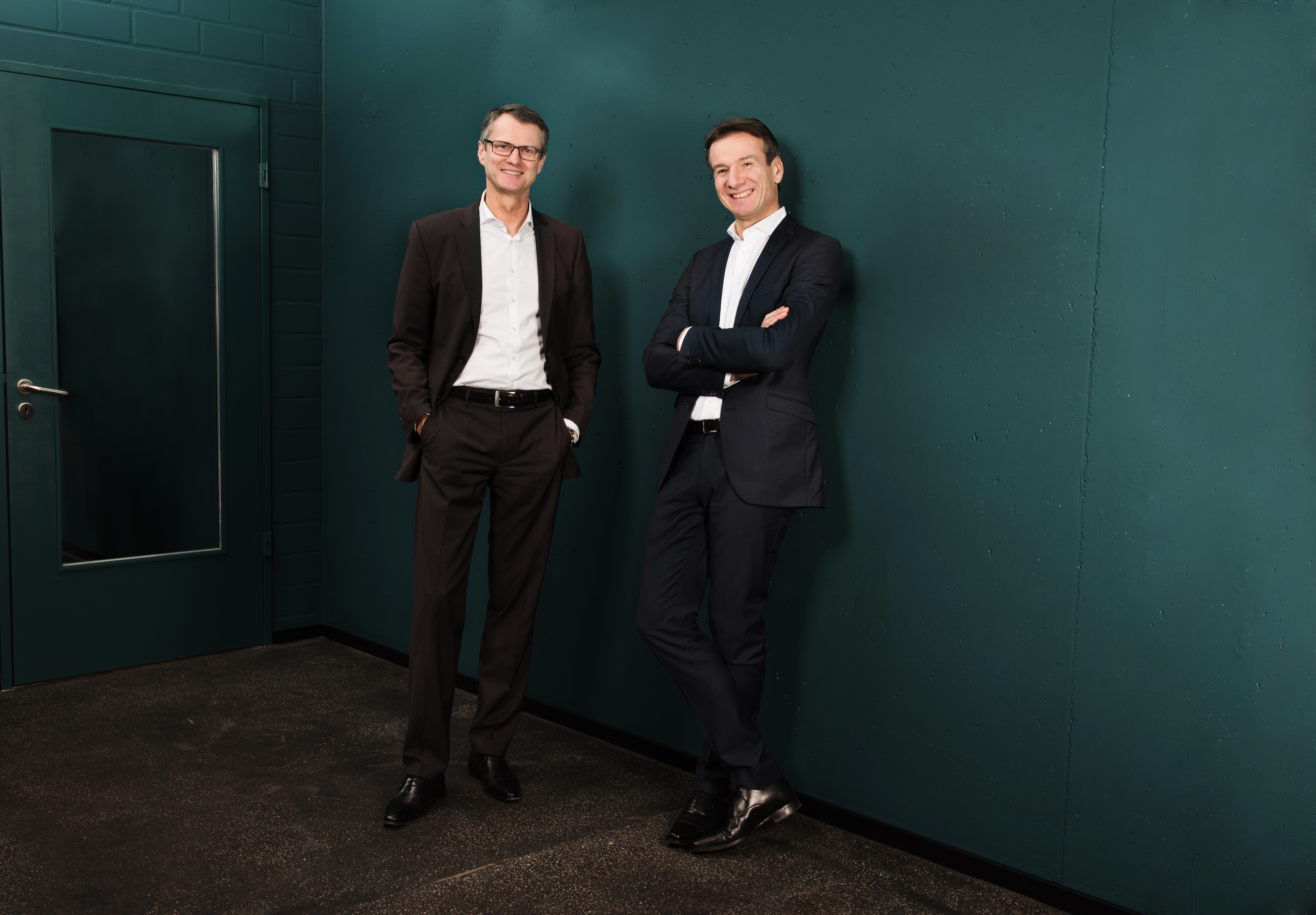 Detlef Zell und Michel Billon, die beiden Geschäftsführer der Hanseatic Bank im Jahr 2018